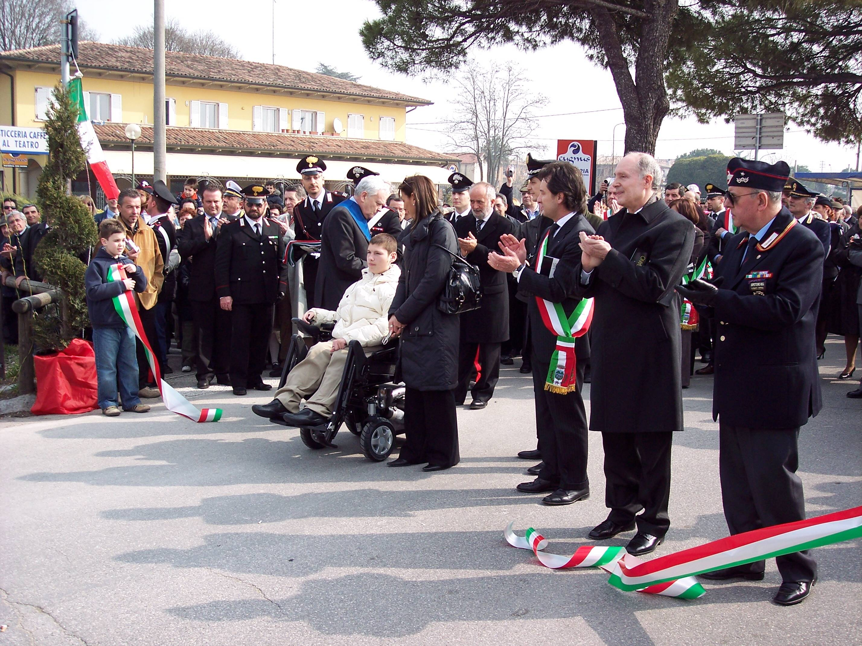 Ponte della memoria Arma dei Carabinieri inaugurazione, lavoro personale, 25 marzo 2006, Pietro Liberati